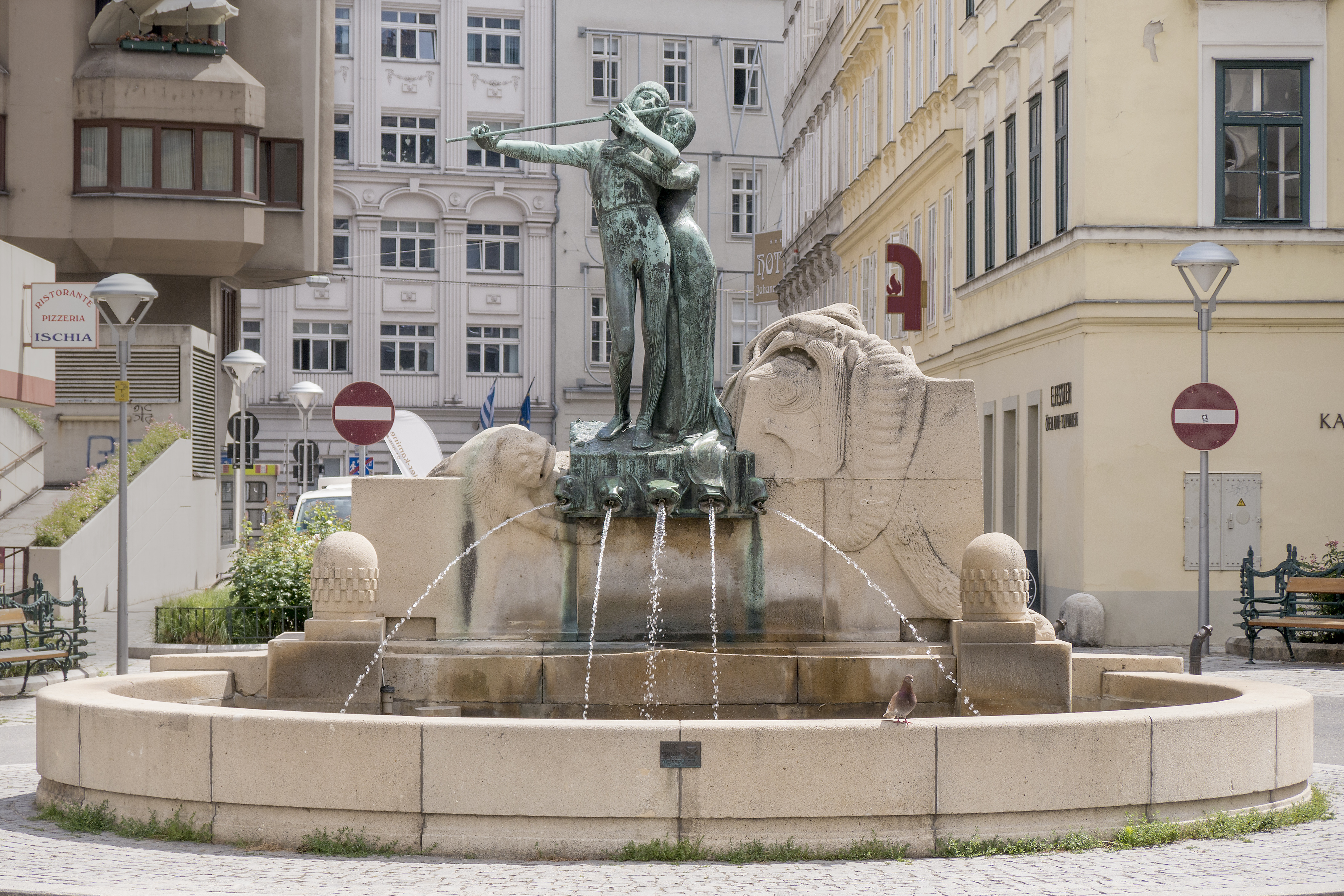 Mozart-Brunnen Wieden